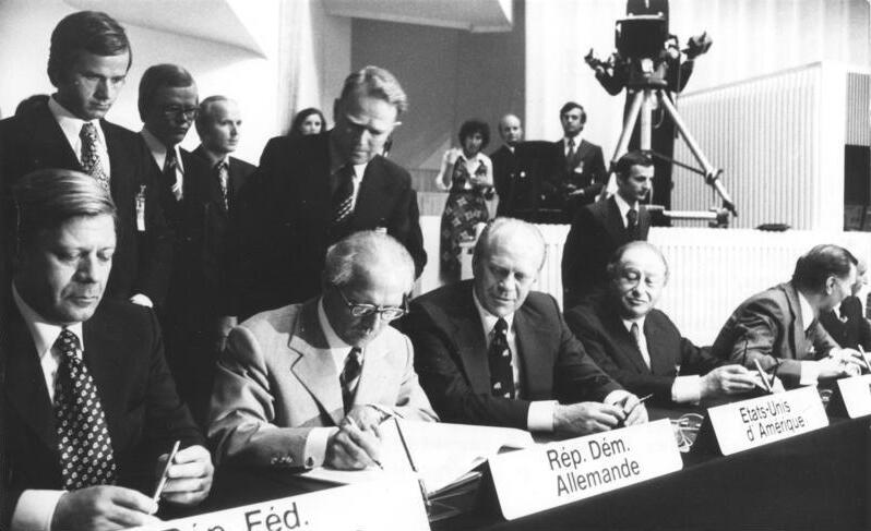 Helsinki, KSZE-Konferenz, Schlussakte ADN-ZB/Sturm/1.8.1975/Helsinki: Europäische Sicherheitskonferenz/Abschlußsitzung/Während der Abschlußsitzung der 3. Phase der Europäischen Sicherheitskonferenz am 1.8.1975 in der Finlandia-Halle in Helsinki unterzeichneten die Delegationsleiter der 35 an der Konferenz beteiligten Staaten das Hauptdokument der Konferenz. V.l.n.r.: Helmut Schmidt, Bundeskanzler der Bundesrepublik Deutschland, Erich Honecker, Erster Sekretär der Sozialistischen Einheitspartei Deutschlands, Gerald Ford Präsident der Vereinigten Staaten von Amerika, Bruno Kreisky, Bundeskanzler der Republik Österreich. [Finnland, Helsinki, KSZE-Konferenz, Unterzeichnung der Schlussakte.- vlnr: Bundeskanzler Helmut Schmidt, Erich Honecker, Gerald Ford, Bruno Kreisky] Abgebildete Personen: Schmidt, Helmut: Bundeskanzler, Verteidigungsminister, SPD, Bundesrepublik Deutschland Honecker, Erich: Staatsratsvorsitzender, Generalsekretär des ZK der SED, DDR (GND 118553399) Ford, Gerald: Präsident, USA Kreisky, Bruno Dr.: Bundeskanzler, Sozialistische Partei, Österreich Information added by Wikimedia users.